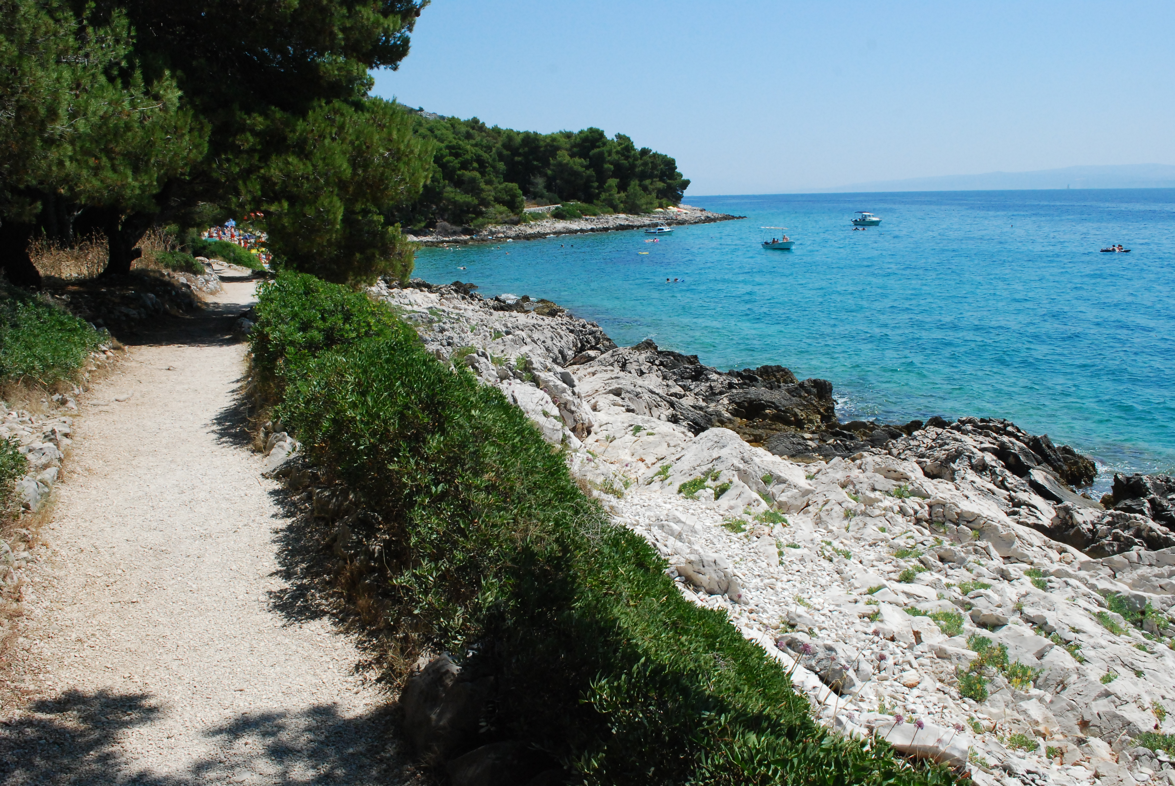 Okrug Gornji, Croatia